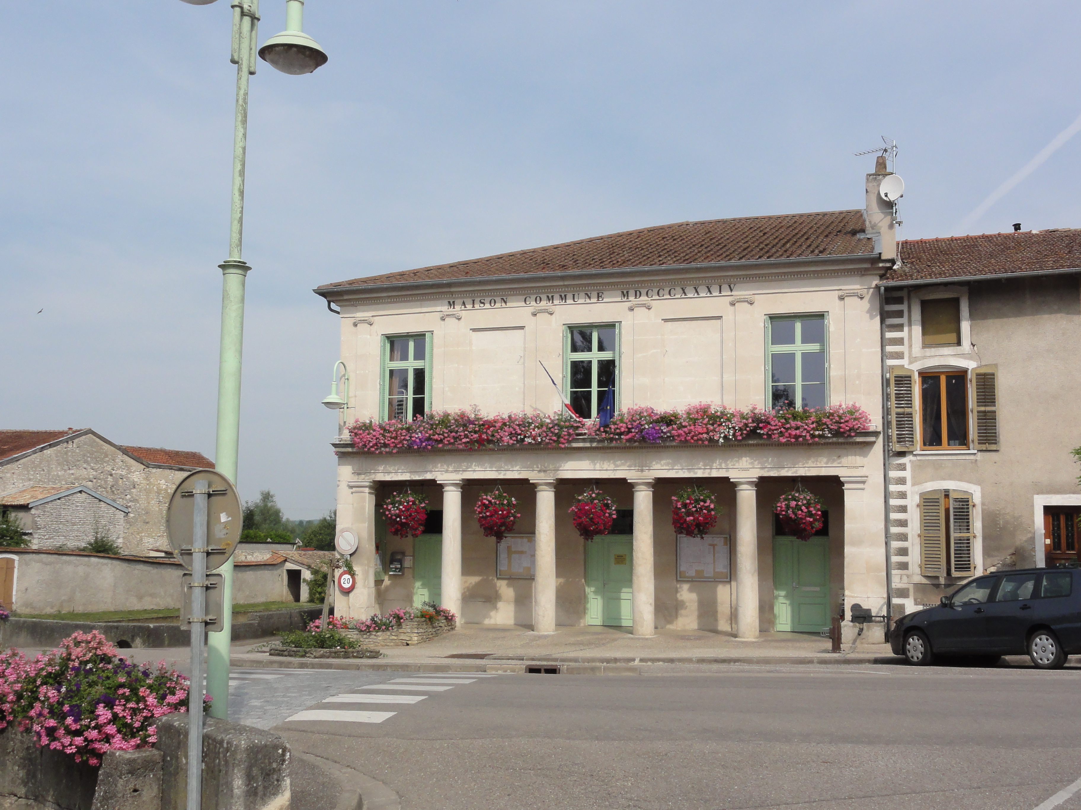 Sorcy-Saint-Martin (Meuse) maison commune (mairie) 1834